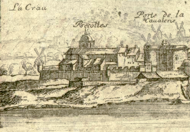 Vue d’Arles en 1660 (détail)Ancien couvent des Recollets, au centre de l'image.